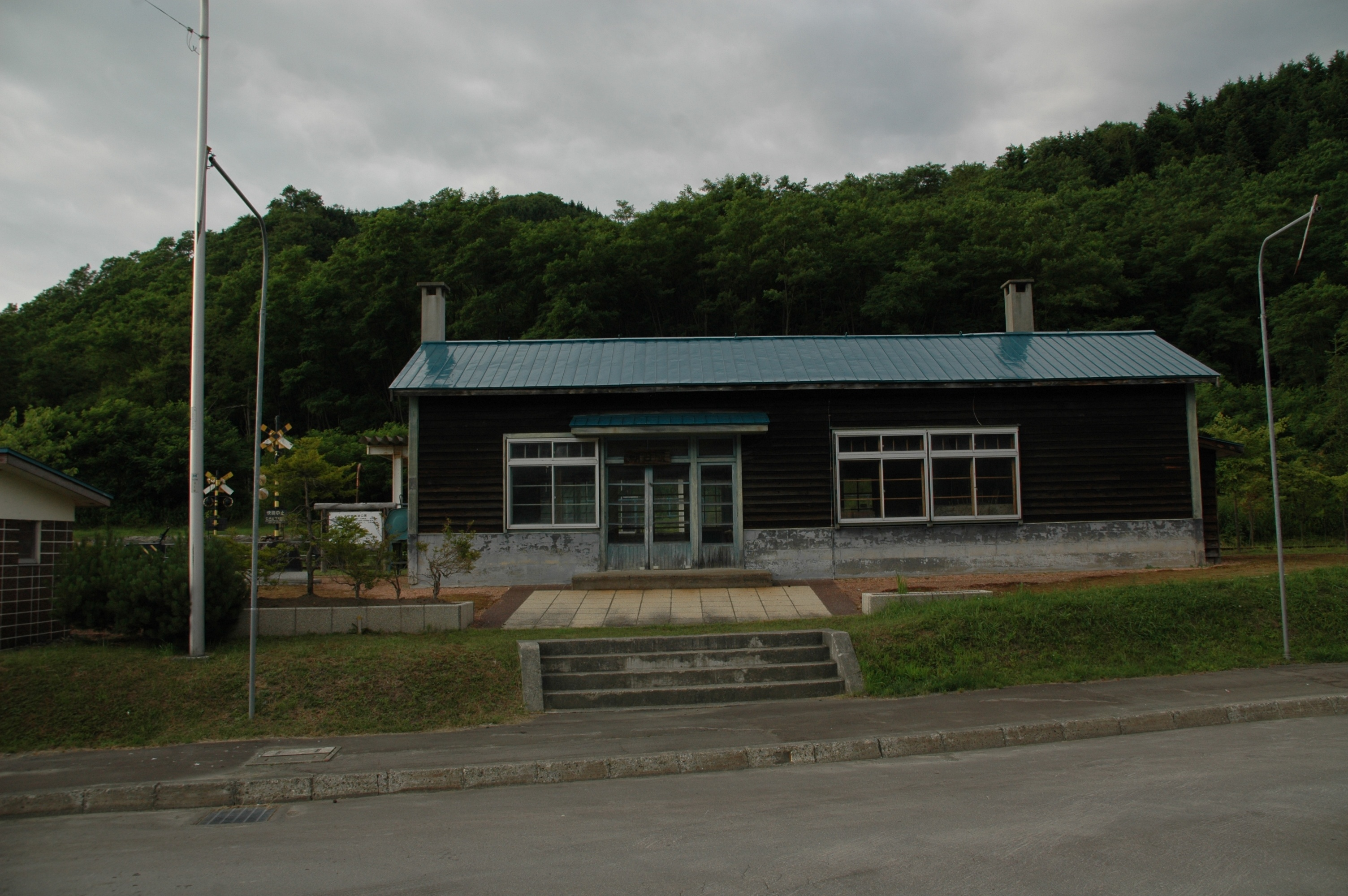 Asahi Station (Manji Line), Hokkaido, Japan.